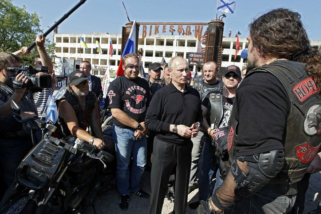 Посещение Владимиром Путиным лагеря байкеров из клуба «Ночные волки». Перед началом рабочего визита на Украину в июле 2012 года по пути из аэропорта Севастополя в Ялту Владимир Путин посетил лагерь байкеров.